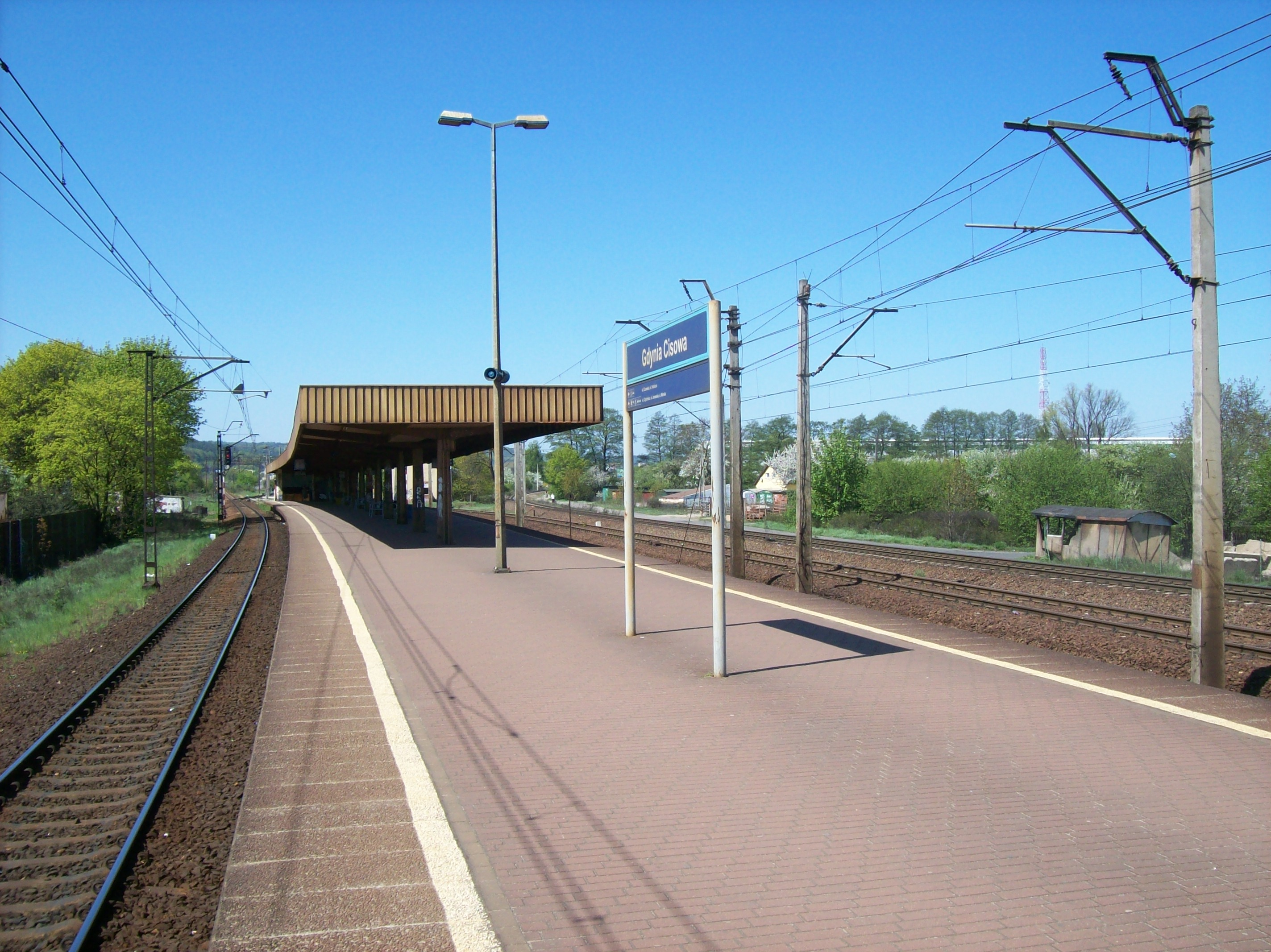 Peron Gdynia Cisowa SKM.